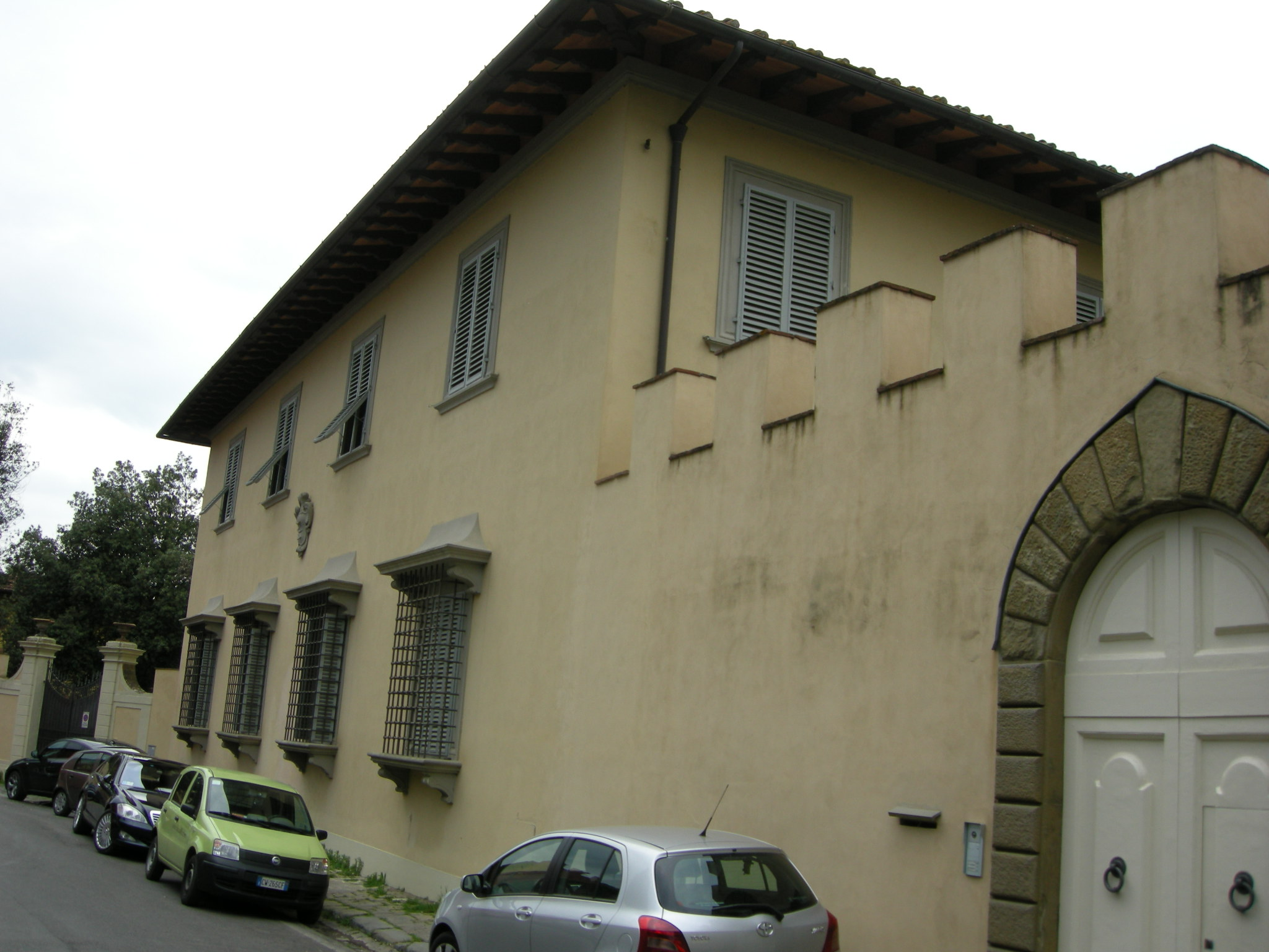 Villa ravà